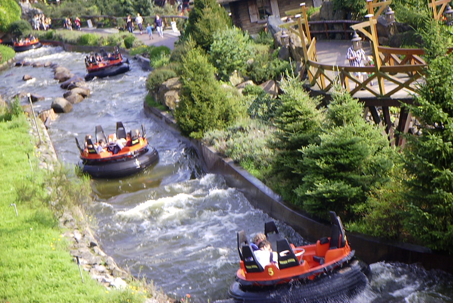 Mountain Rafting Heide-Park